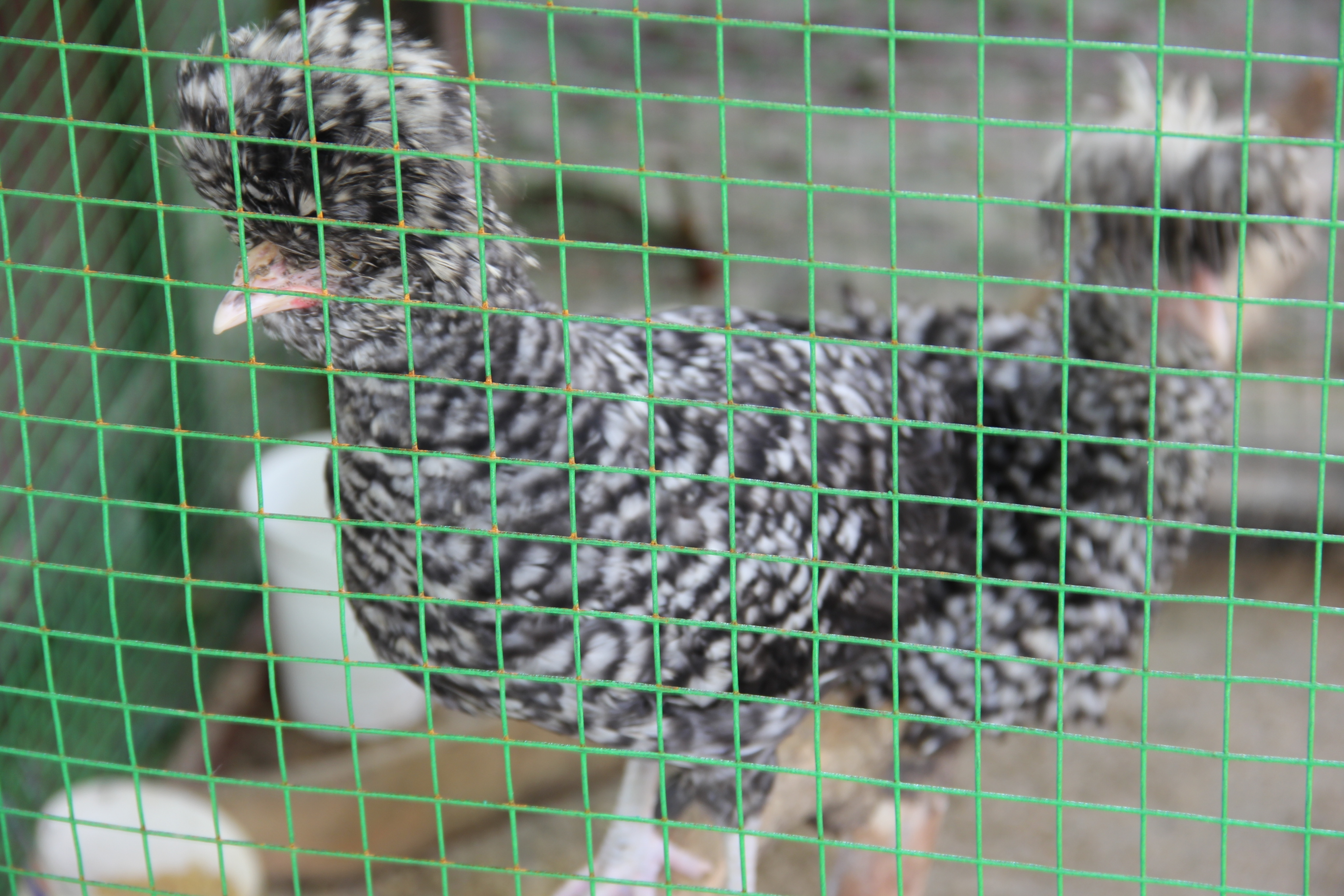 Hình tự chụp bằng máy ảnh kỹ thuật số về một con gà Quý Phi (con mái) đang được trưng bày tại Khu du lịch Đại Nam